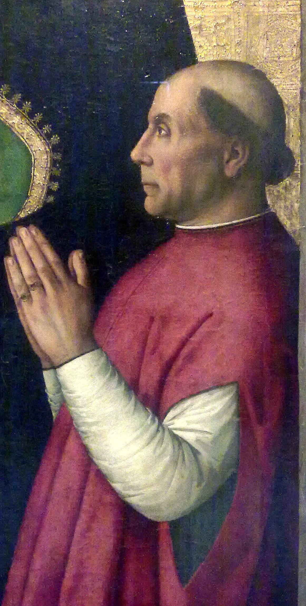 Fotografía, con encuadre en plano medio, tomada del cuadro original denominado "La Virgen de las Fiebres y don Francisco de Borja" que realizó Pinturicchio para la Capilla Sepultura Borja de Nuestra Señora de las Fiebres, que estuvo ubicado en el antiguo vaso de los caballeros Borja en la Seo de Játiva (Valencia) y que actualmente es conservado en el Museo de Bellas Artes de Valencia, en el que figura el cardenal de Cosenza Francisco de Borja y Navarro de Alpicat.